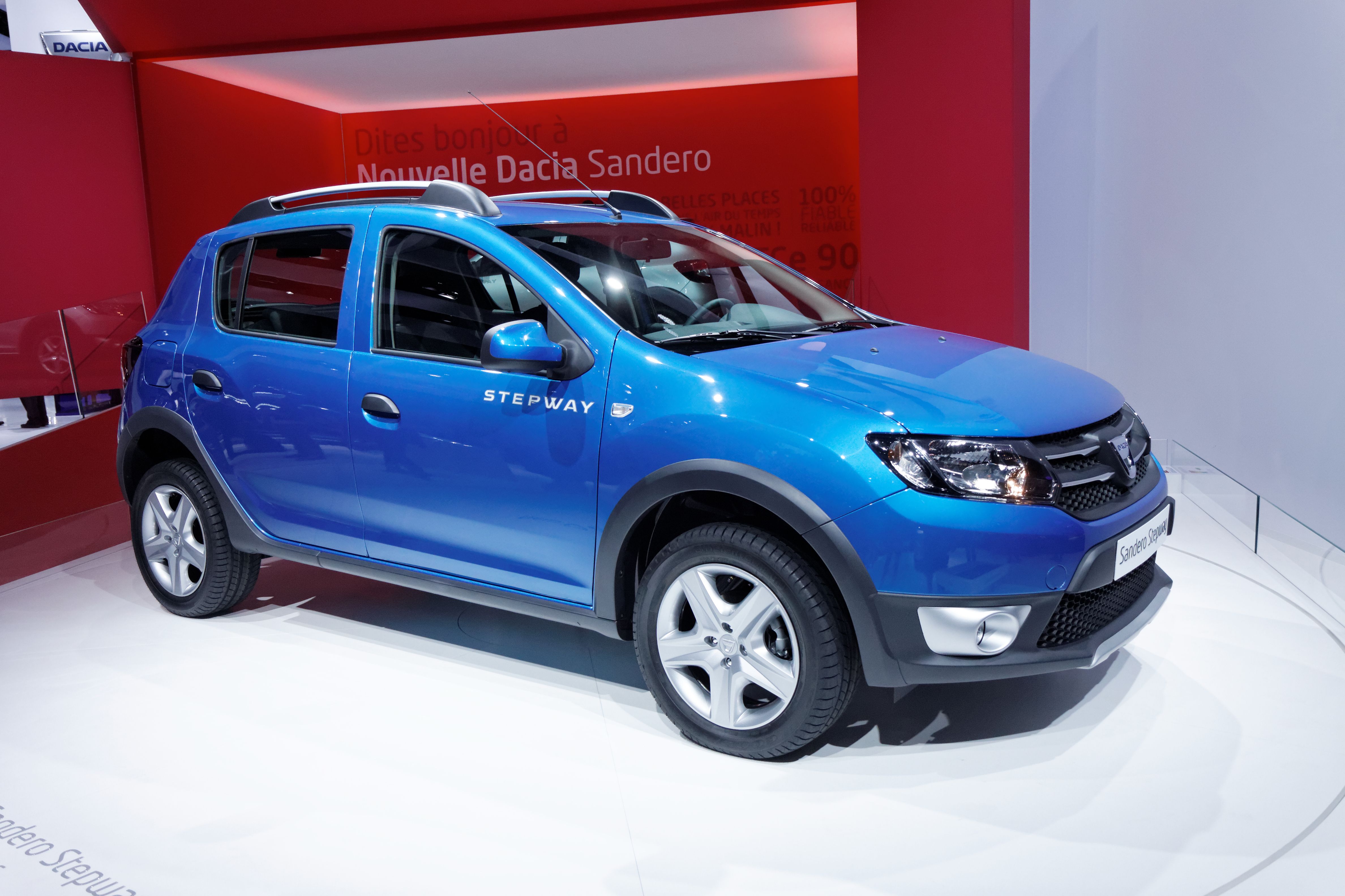 Une Dacia Sandero Stepway présentée lors du Mondial de l'automobile de Paris 2012.